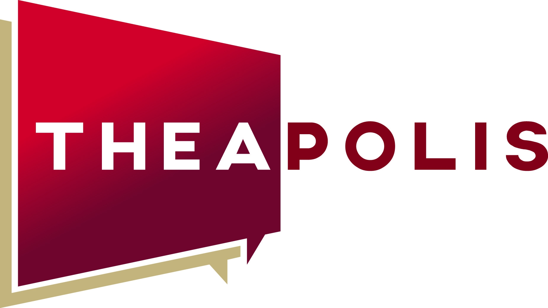 Logo THEAPOLIS